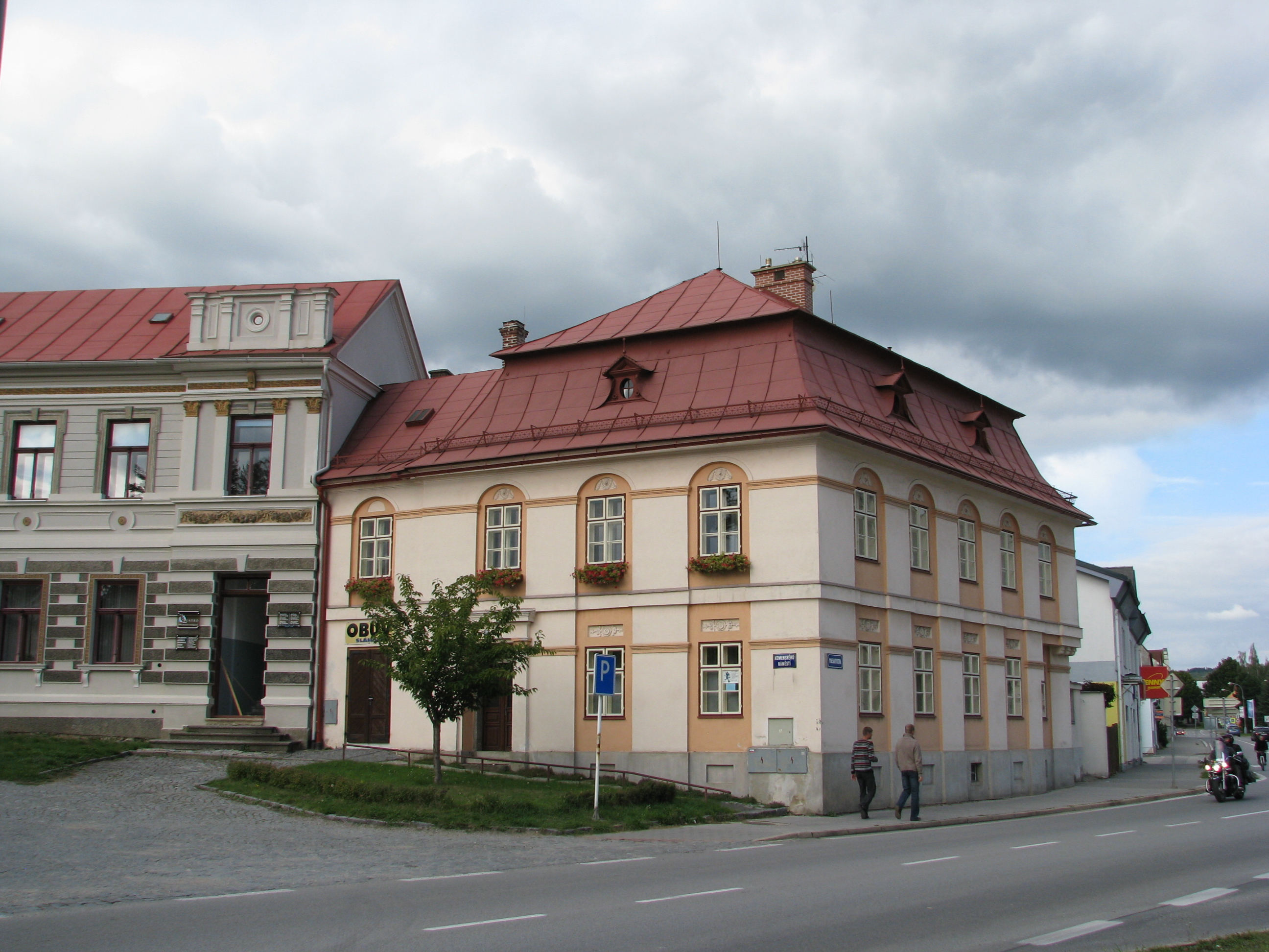 Fara evangelická, nám. Komenského 135, nám. Komenského 135